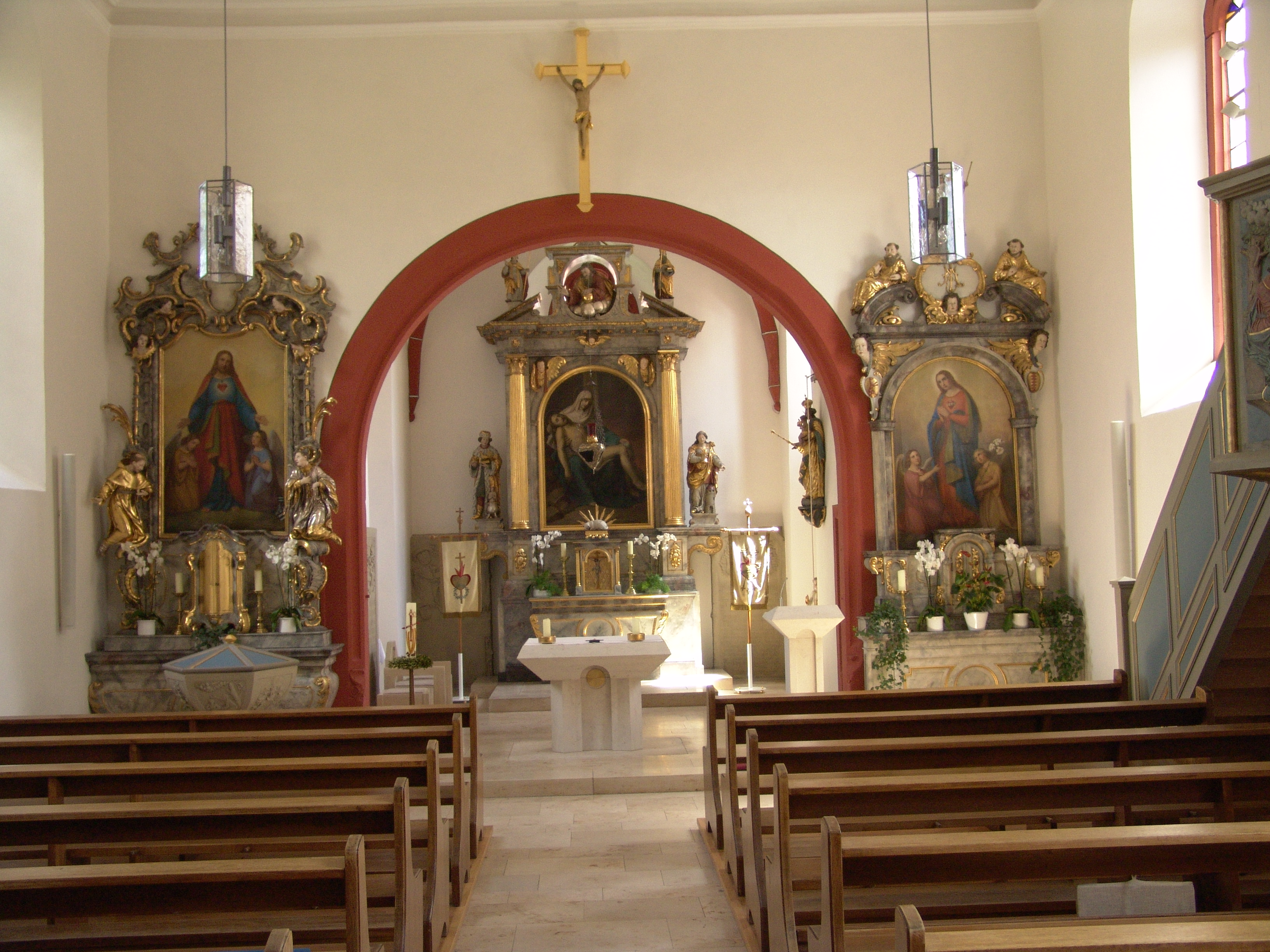 Mainsondheim Pfarrkirche BMV